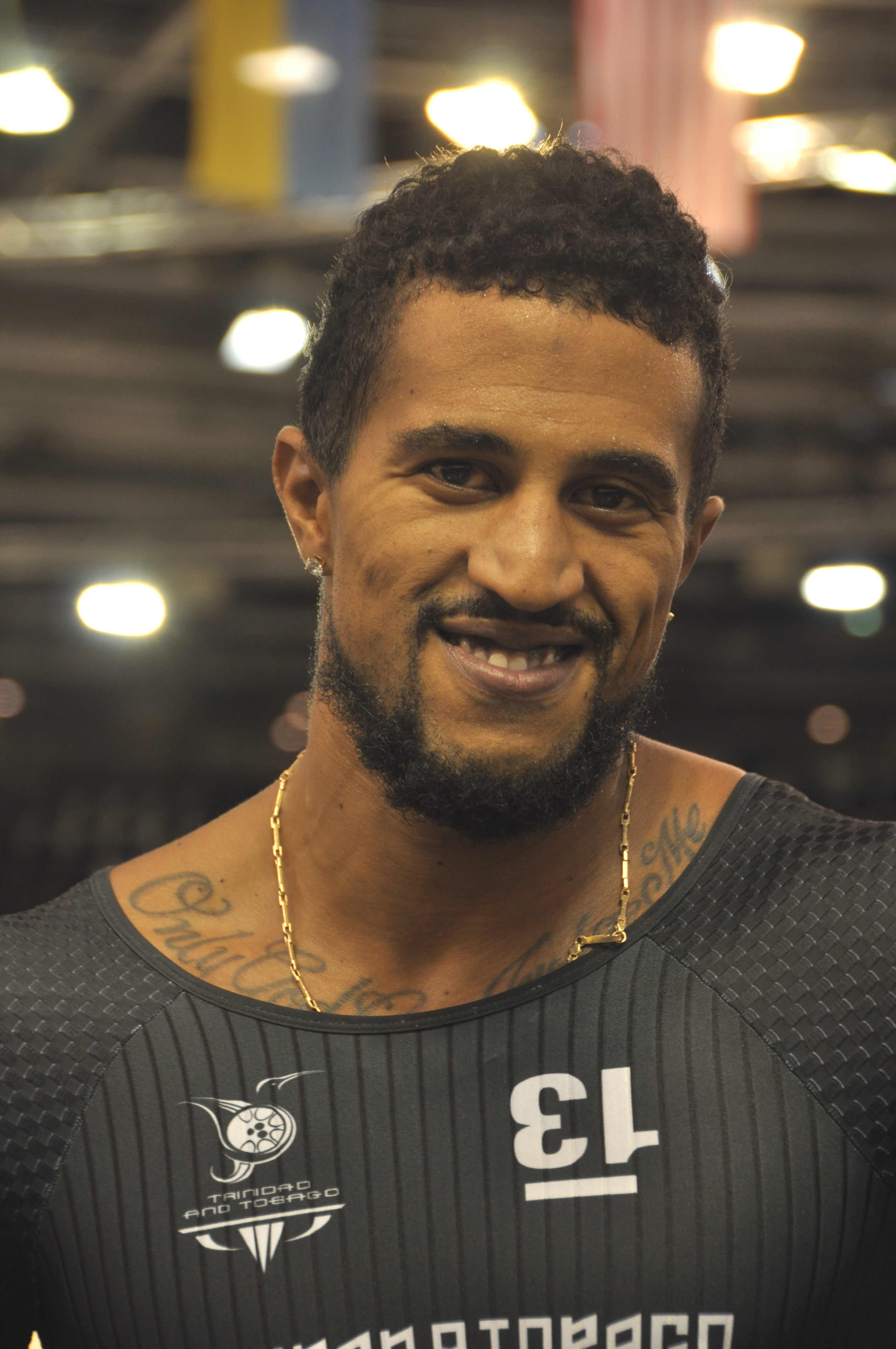 Njisane Phillip, Radsportler aus Trinidad und Tobago